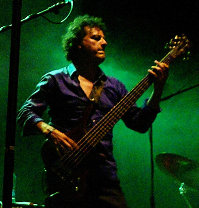 Fulano en el 7° Festival Internacional de Jazz de Puerto Montt